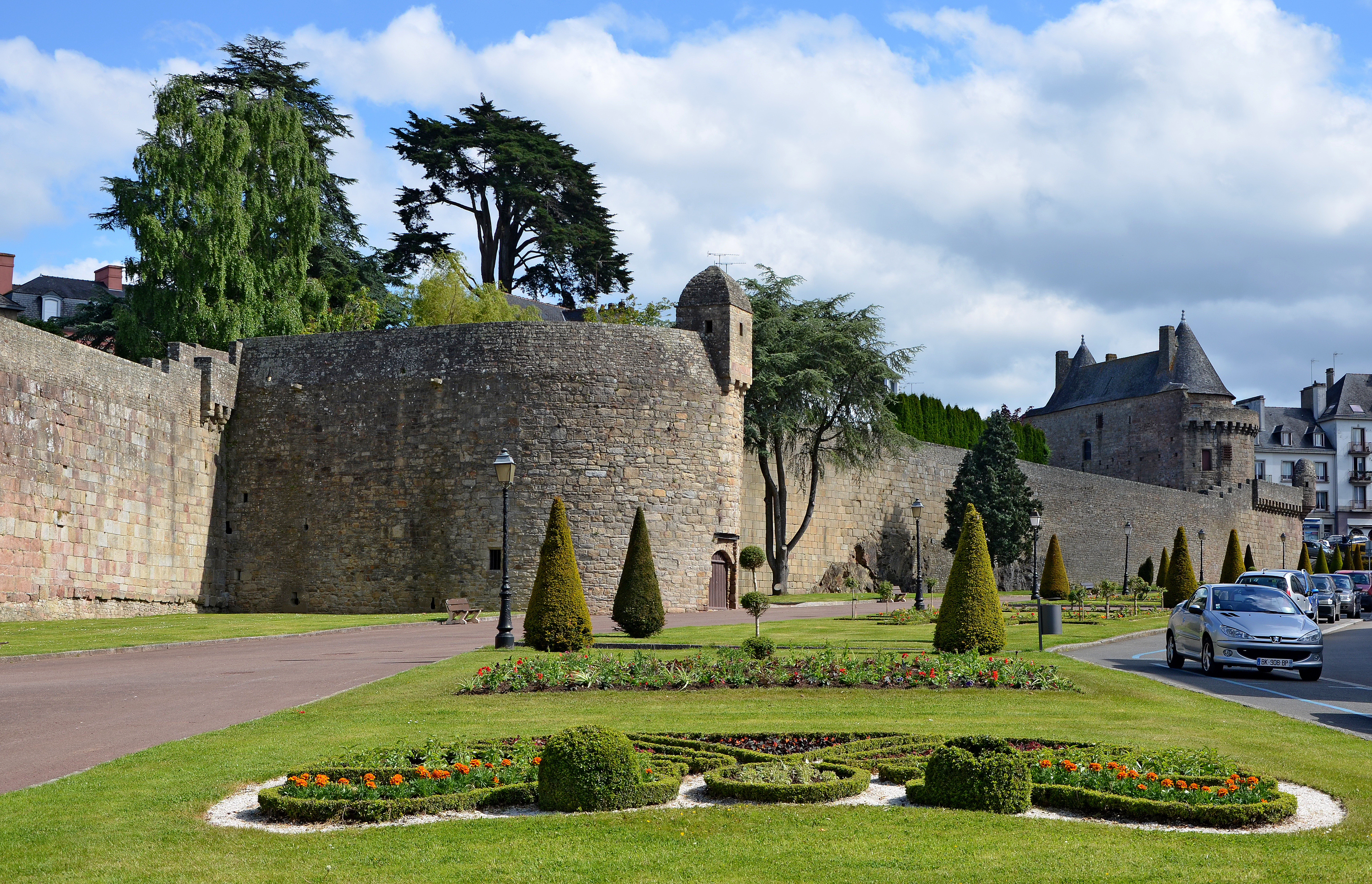 Remparts et jardin de Hennebont, Morbihan, France .